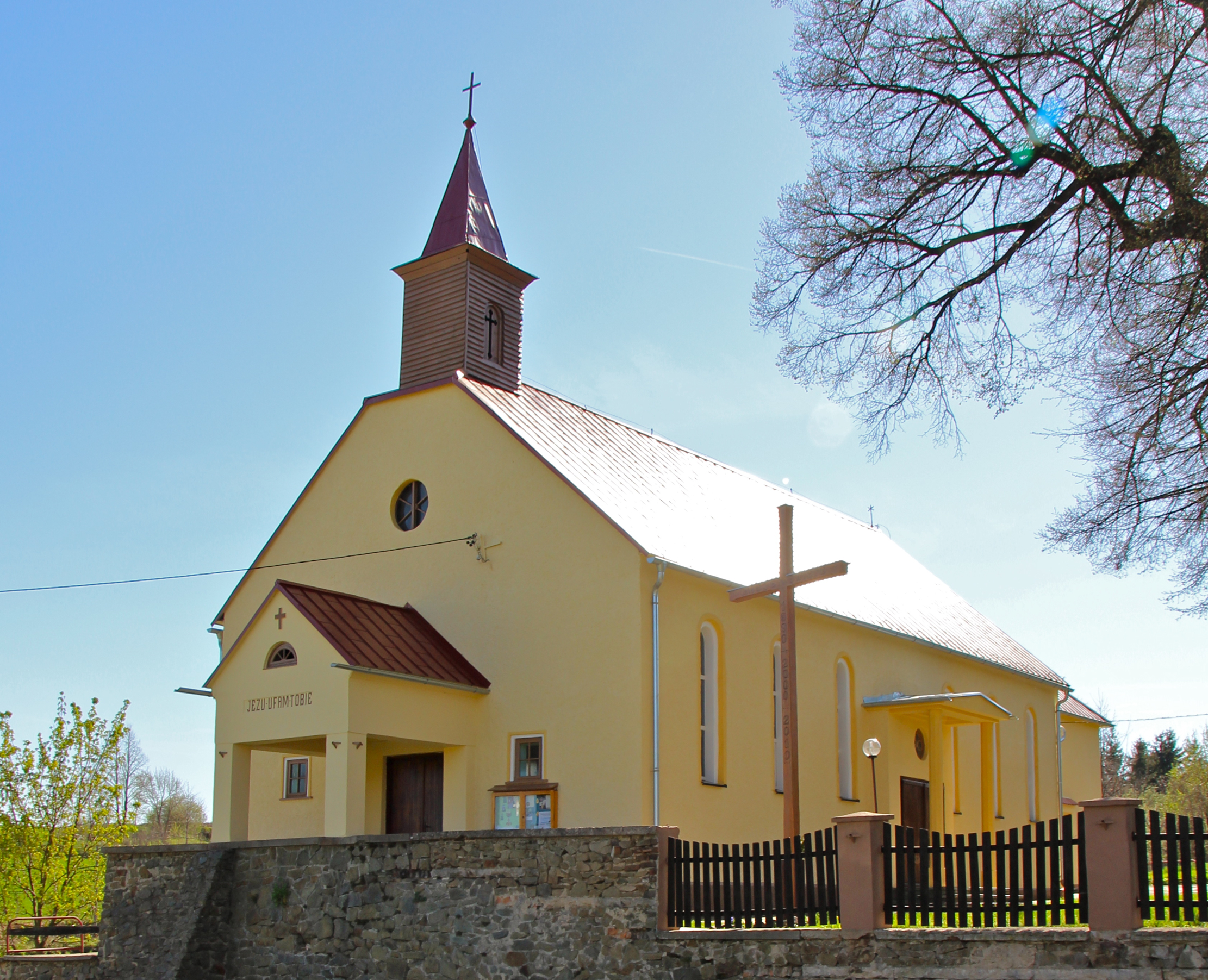 Pietrowice - rzymskokatolicki kościół filialny pw. Najświętszego Serca Pana Jezusa.